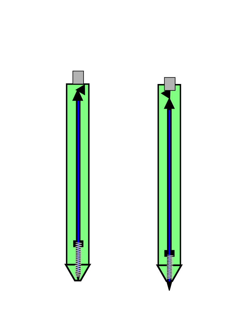 Zjednodušený princip propisky